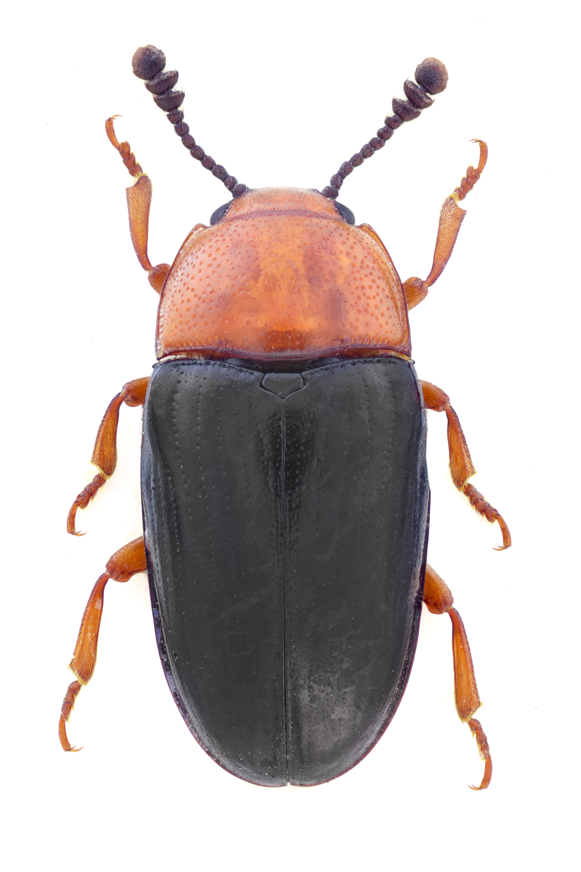 Triplax russica